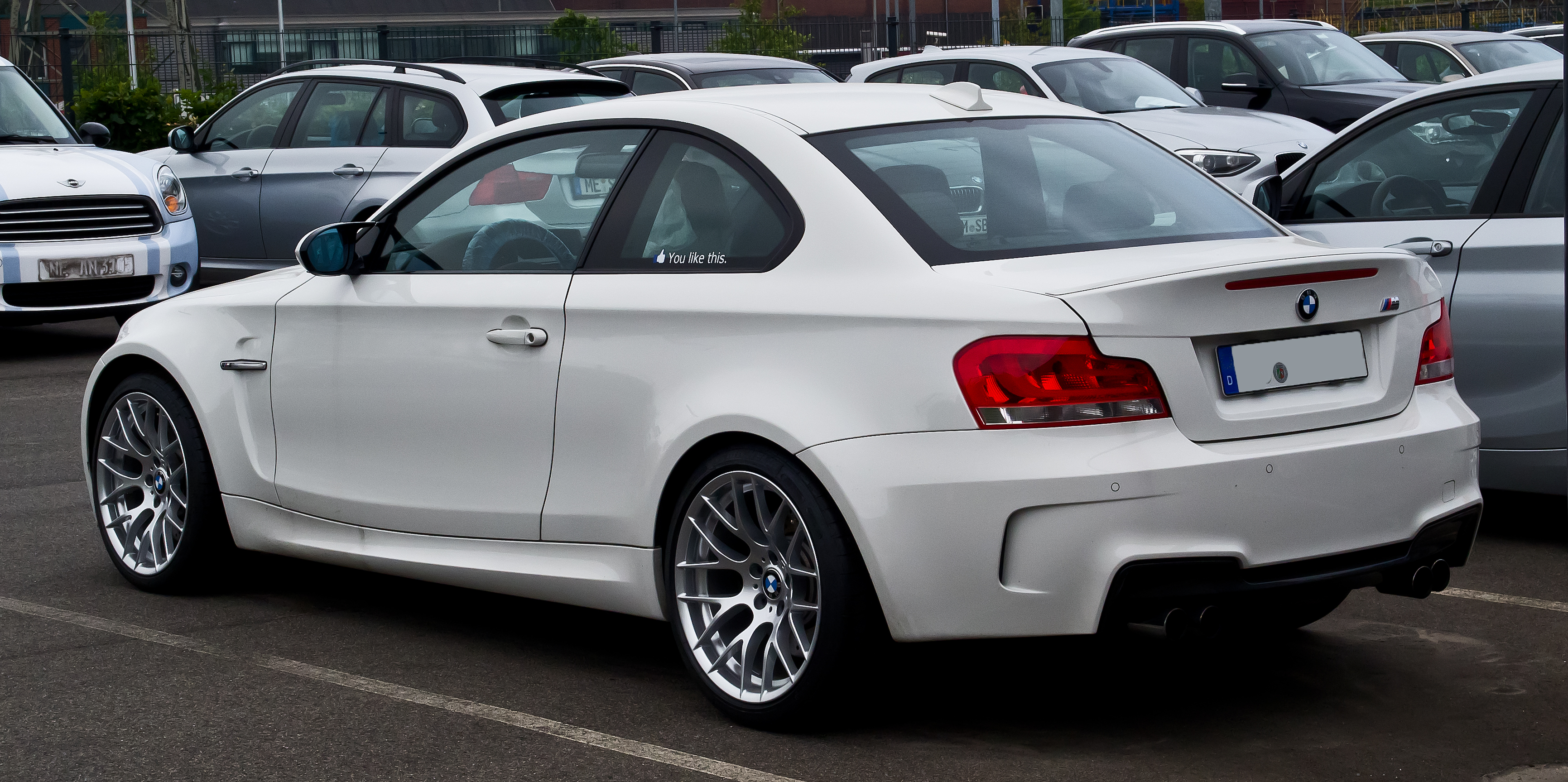 BMW 1er M Coupé (E82)